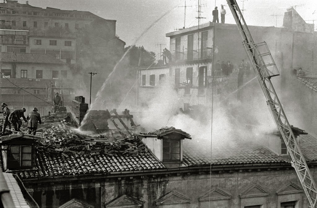 Título original: Incendio desatado en un almacén en el barrio de Amara Viejo (4/5) Localización: San Sebastián (Guipúzcoa)